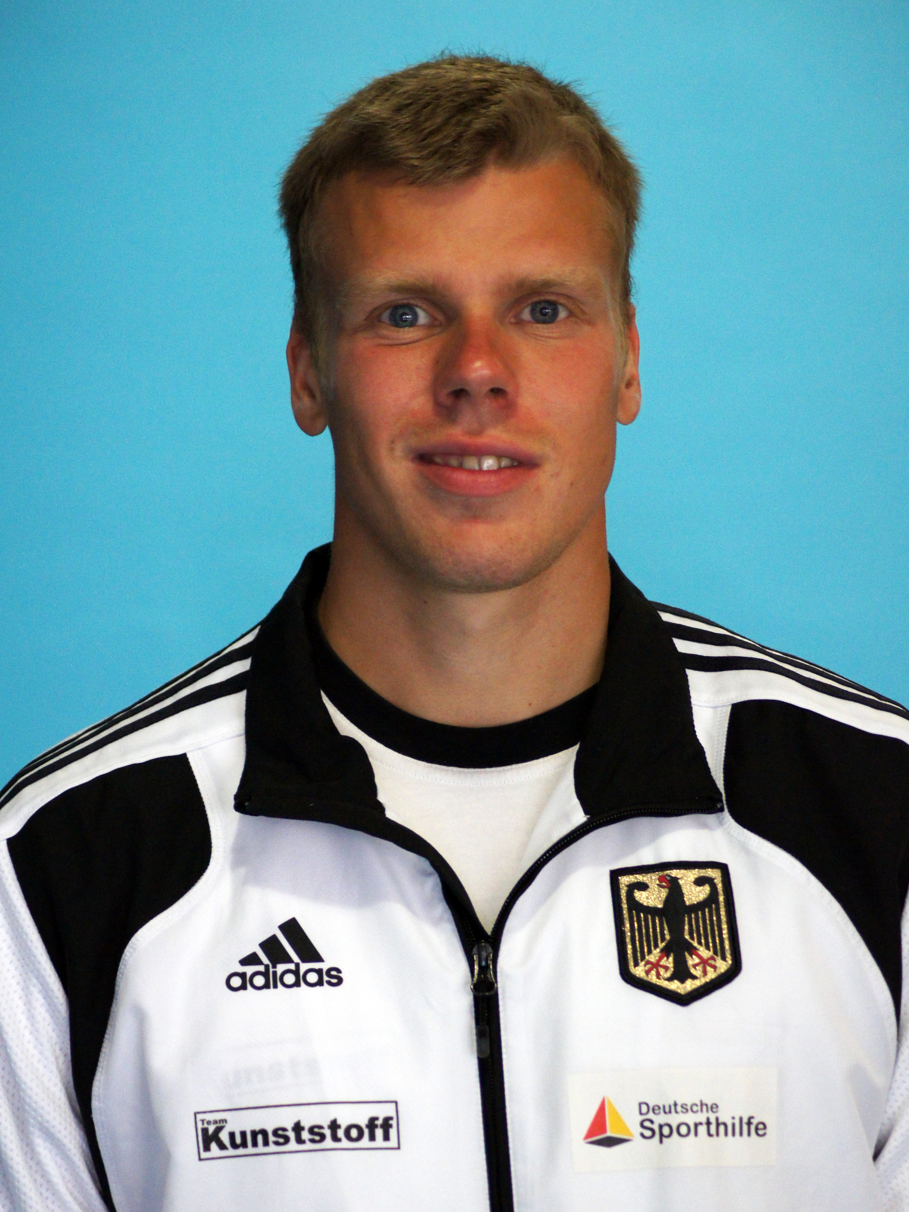 Kurt Kuschela, deutscher Kanu-Rennsportler und Olympiateilnehmer